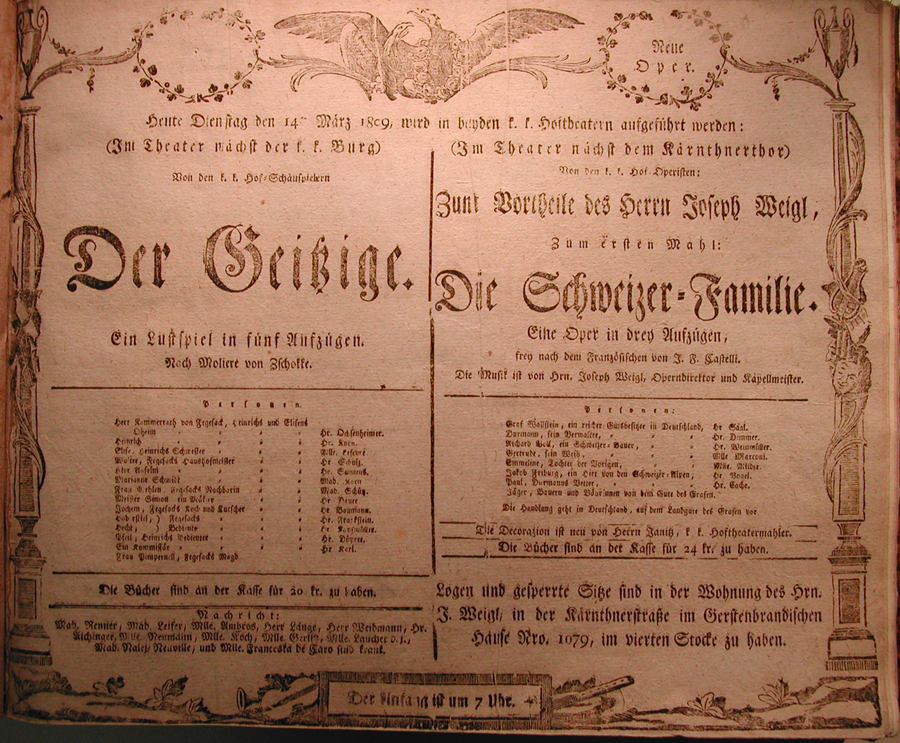 Playbill march 14th 1809